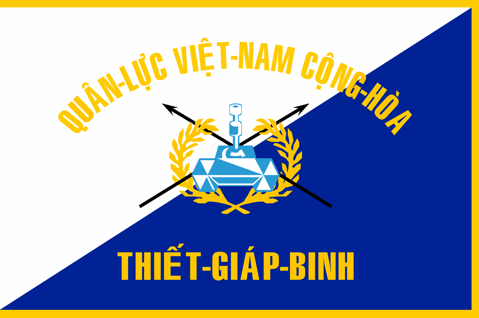 The flag of Army of the Republic of Vietnam's Armored Cavalry Regiment, used since 1957 to 1975.